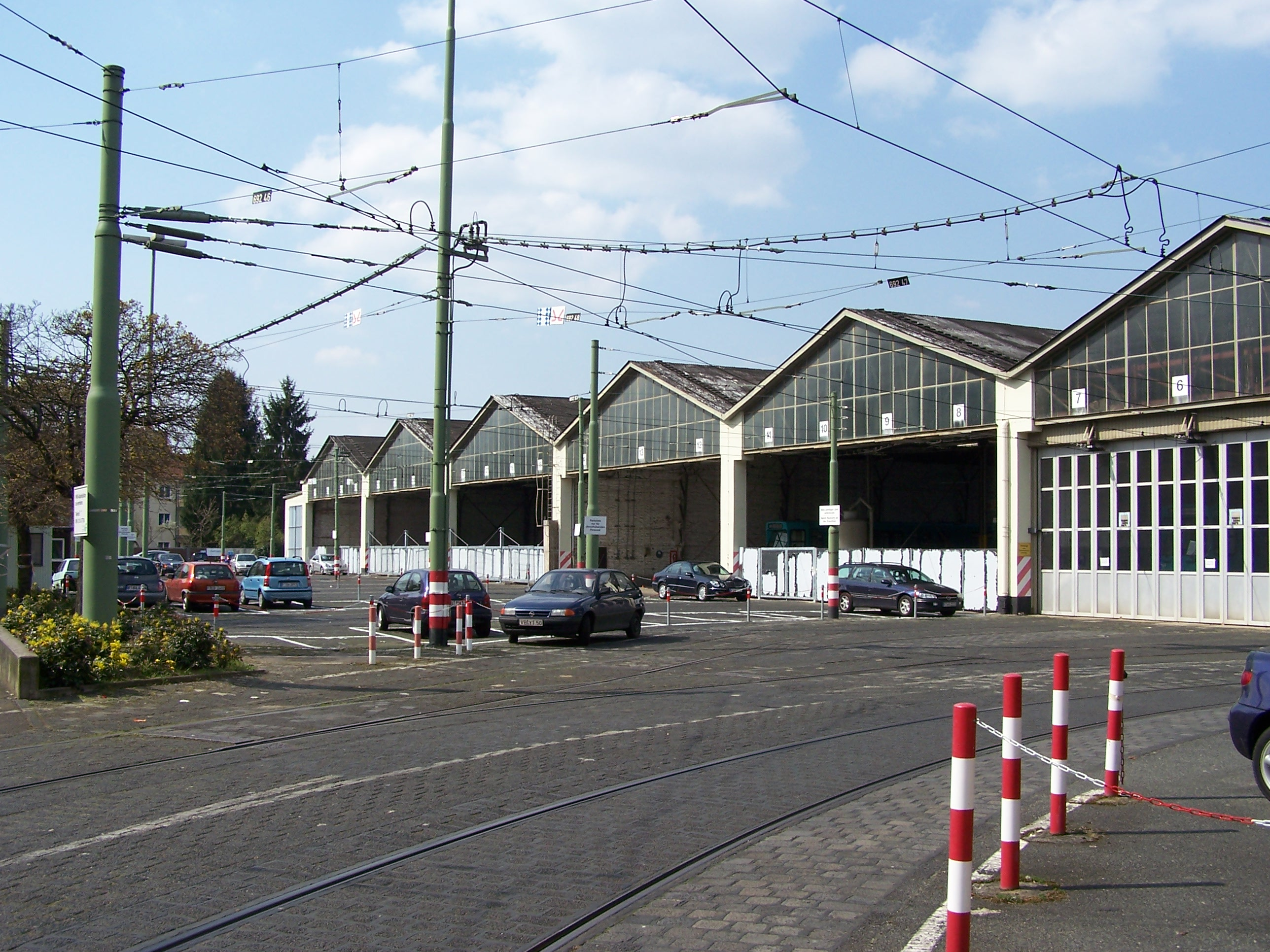 Eckenheimer Depot an der Schwabstraße